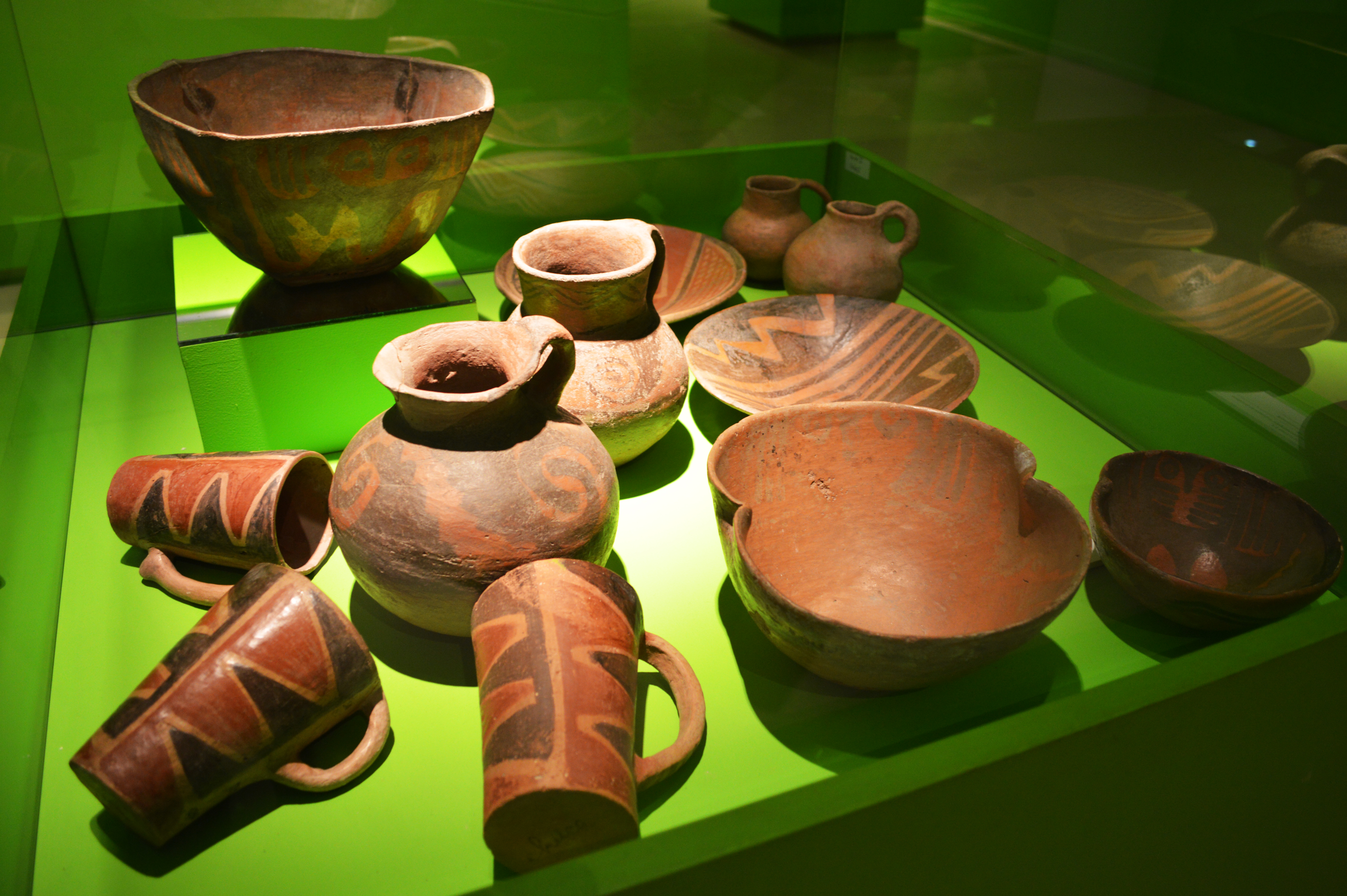 Alfarería indígena